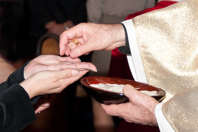 Primanje svete pričesti, Obred svete potvrde u Kapucinskoj crkvi Gospe Lurdske u Rijeci